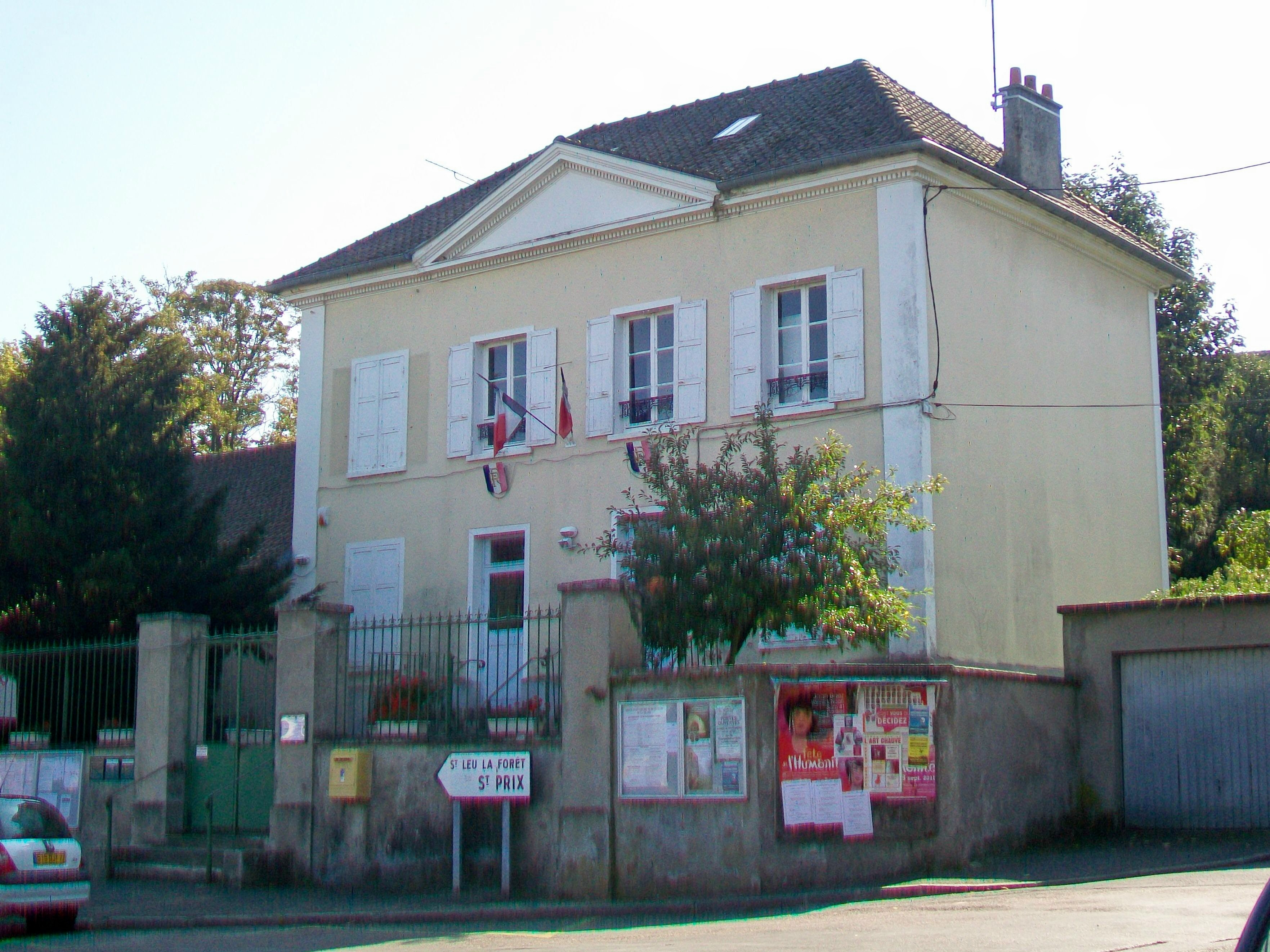 La mairie de Chauvry (95).